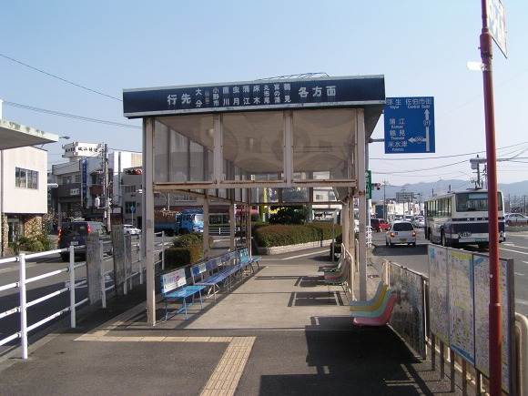 佐伯駅の駅前広場にあるバス待合所です。 2005年3月31日に投稿者が撮影しました。